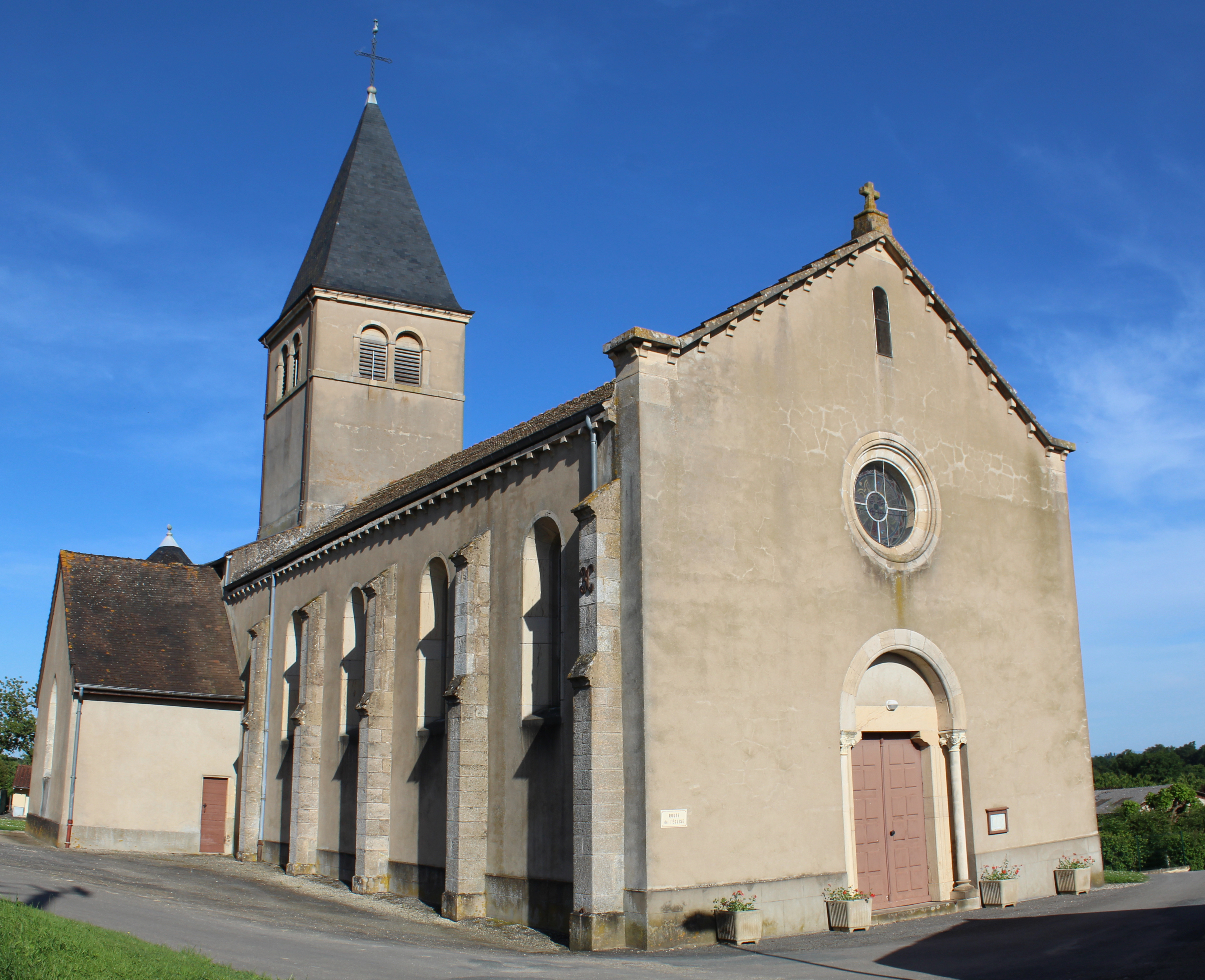 Église Saint-Martin de Chavannes-sur-Reyssouze.